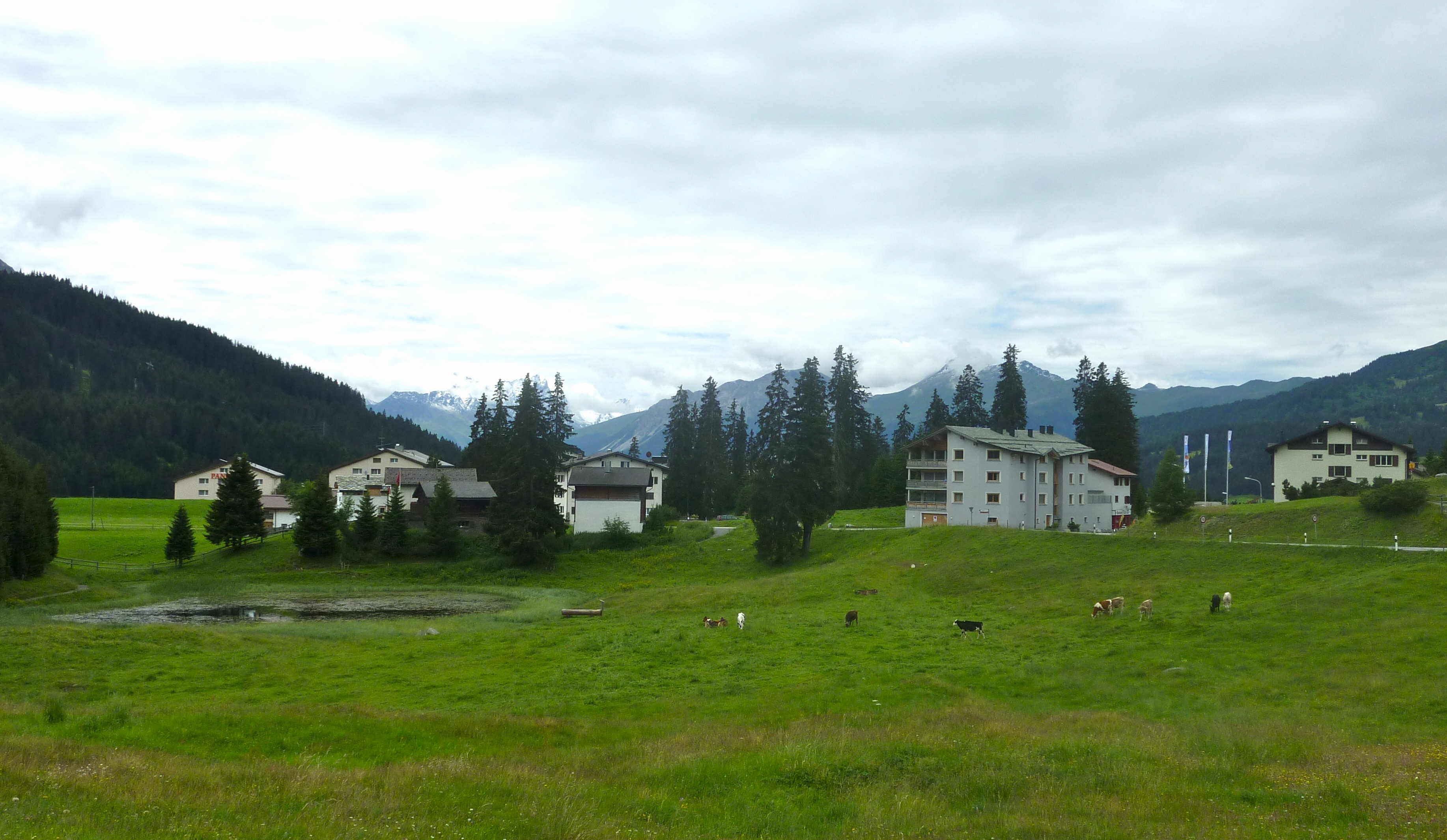 Valbella : Valbella nördlicher Ortseingang, nach S